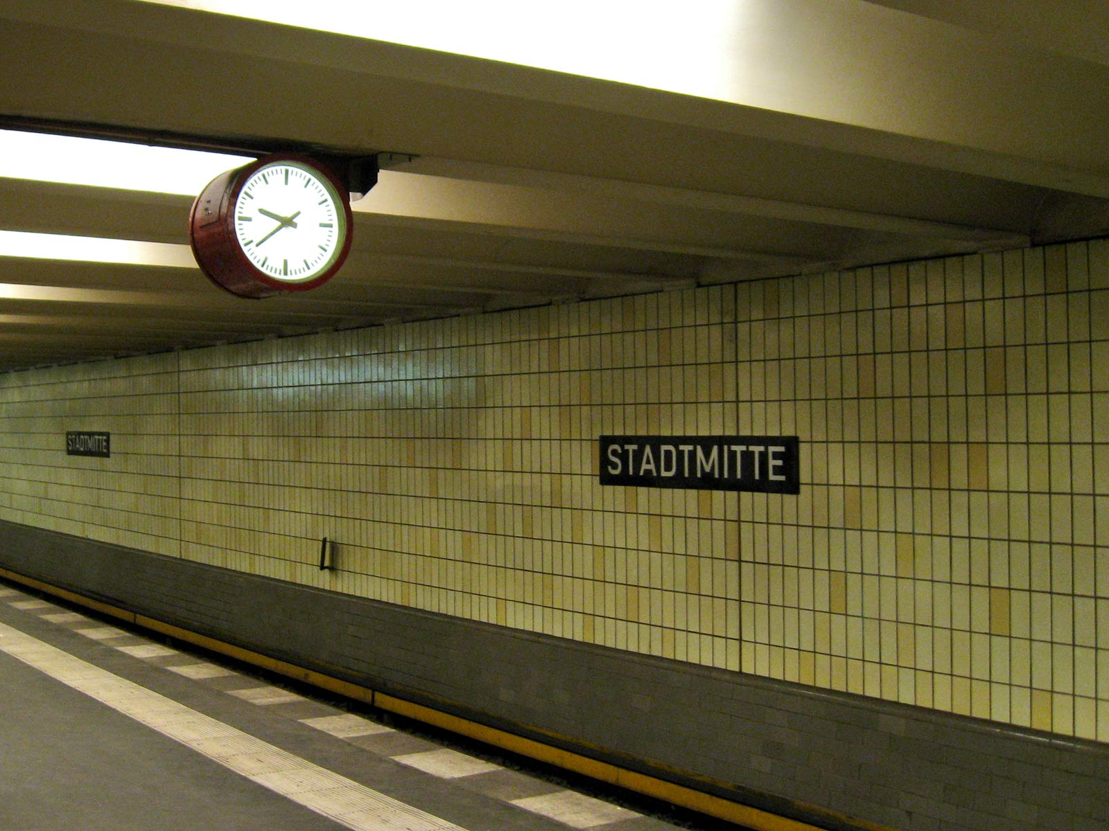 Berlin U-Bahn station Stadtmitte on line U2